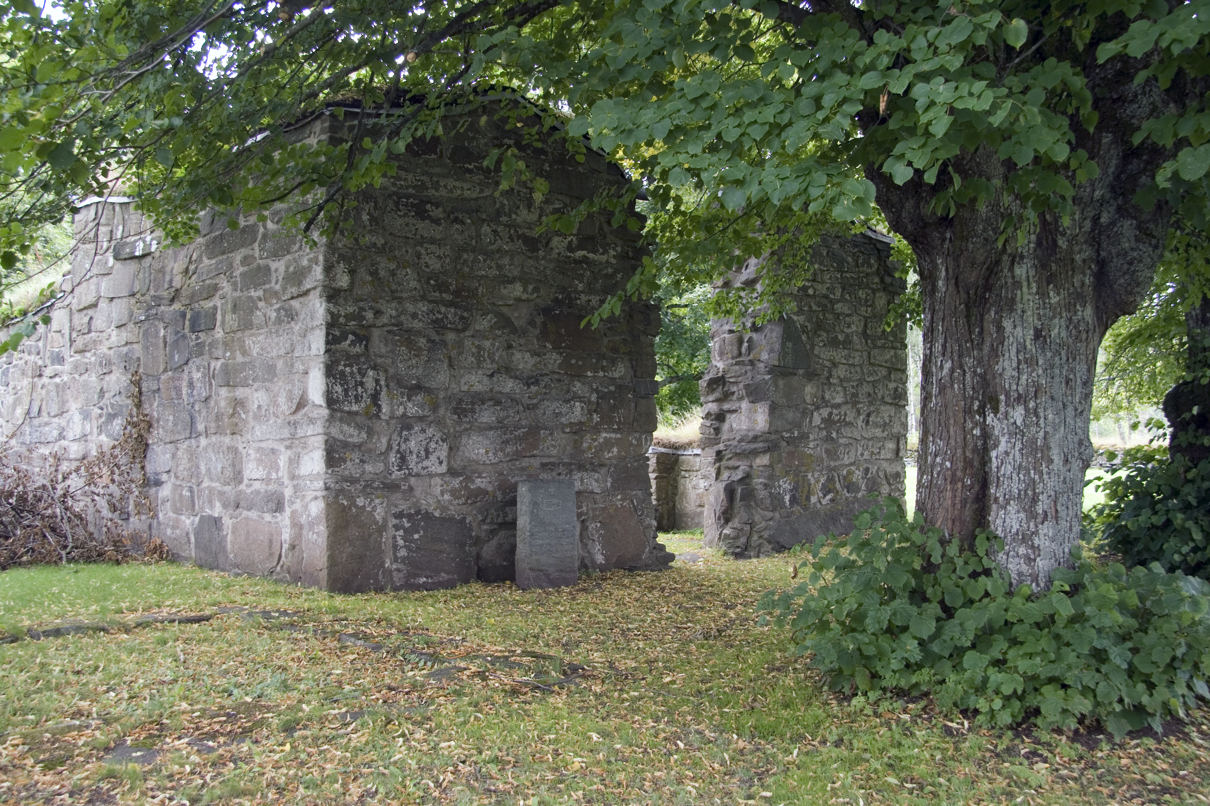 Skallsjö kyrkoruin